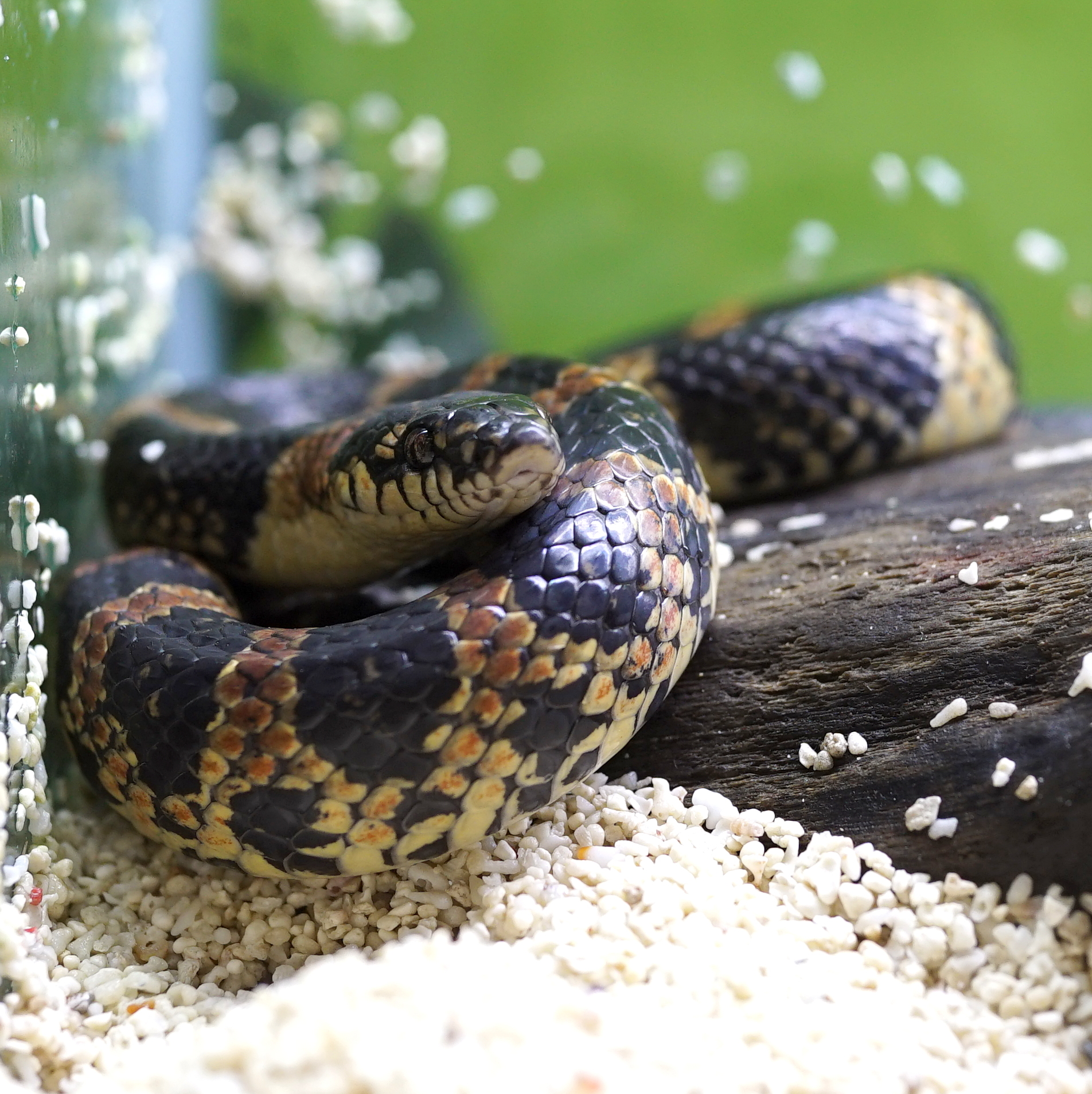 アカマタ Loo-Choo Big-tooth Snake, Ryukyu Odd-tooth snake Domain: Eukaryota • Regnum: Animalia • Phylum: Chordata • Subphylum: Vertebrata • Infraphylum: Gnathostomata • Superclassis: Tetrapoda • Classis: Reptilia • Ordo: Squamata • Familia: Colubridae • Genus: Lycodon Wikispecies has an entry on: Lycodon semicarinatus. Species Lycodon semicarinatus (COPE, 1860) 動物界 脊索動物門 爬虫綱 有鱗目 ナミヘビ科 Lycodon属 Location: Suma Aqualife Park, Japan Other photos: NCBI Taxonomy ID:56549 EOL link: Lycodon semicarinatus uBio search link: Lycodon semicarinatus Copyright: User:OpenCage